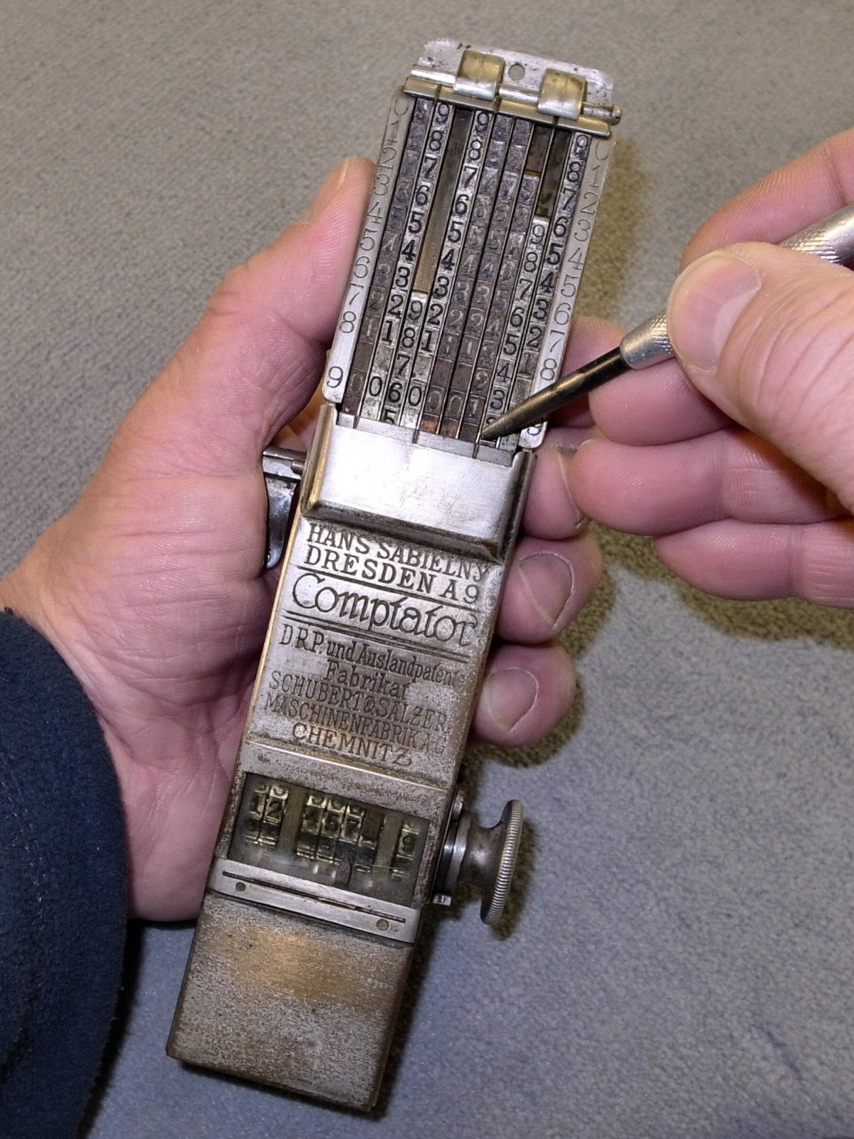 Comptator 9 von Hans Sabielny (Zahnstangenaddierer), Baujahr um 1920